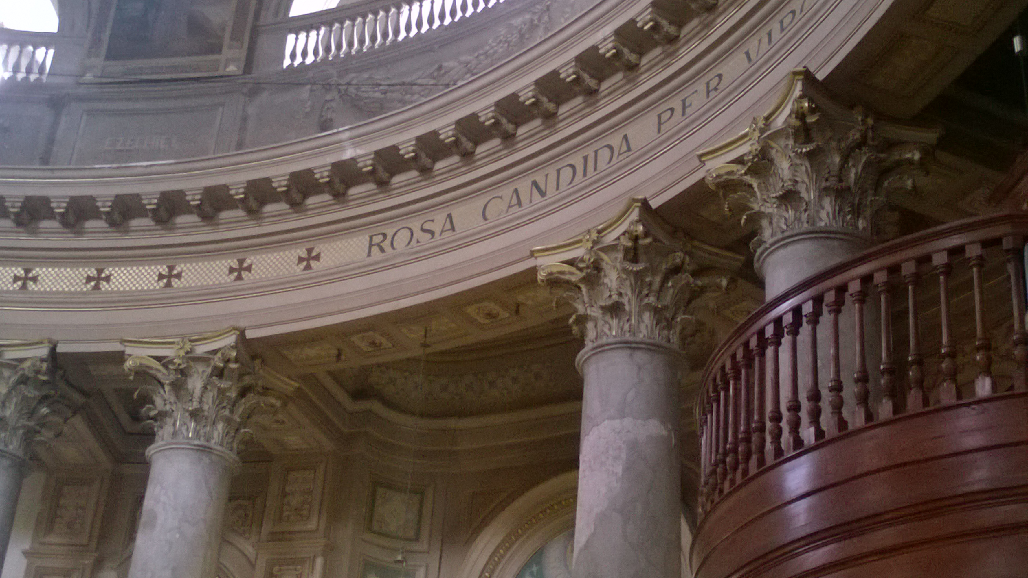 Columnas, Ornamentacion